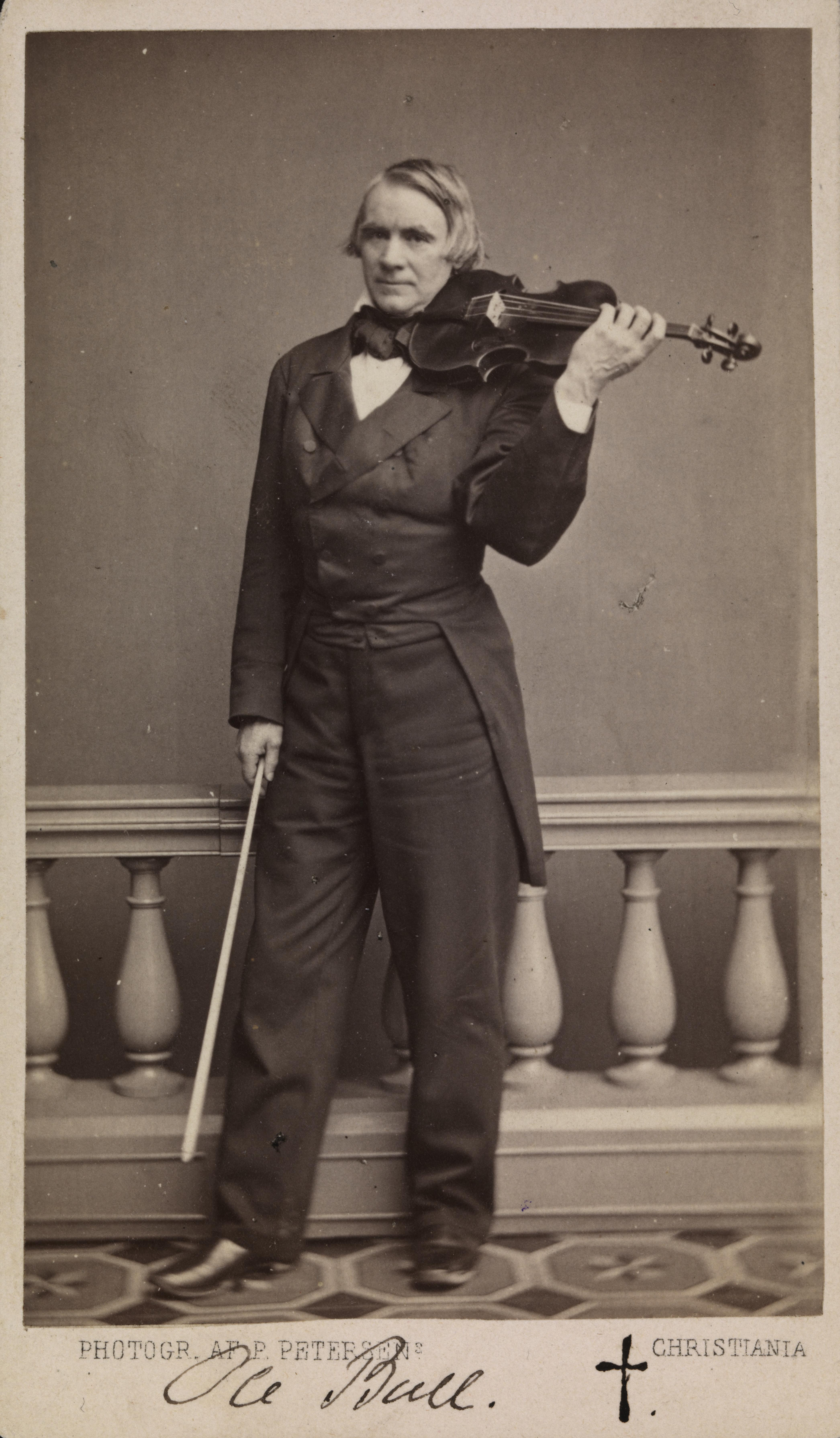 Bildet er hentet fra Nasjonalbibliotekets bildesamling Depicted person: Bull, Ole